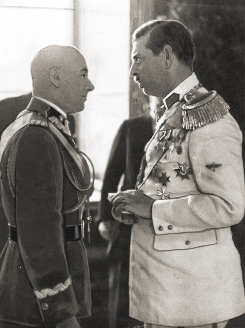 Król rumuński Karol i marszałek Rydz-Śmigły podczas wizyty monarchy w Polsce w 1937 r., zdjęcie z tygodnika Światowid.